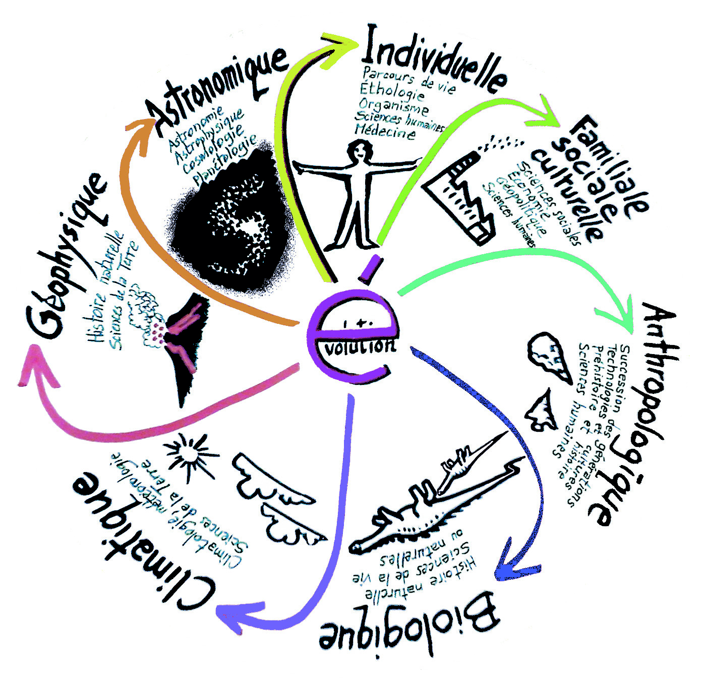 Schéma : quelques exemples d'évolutions